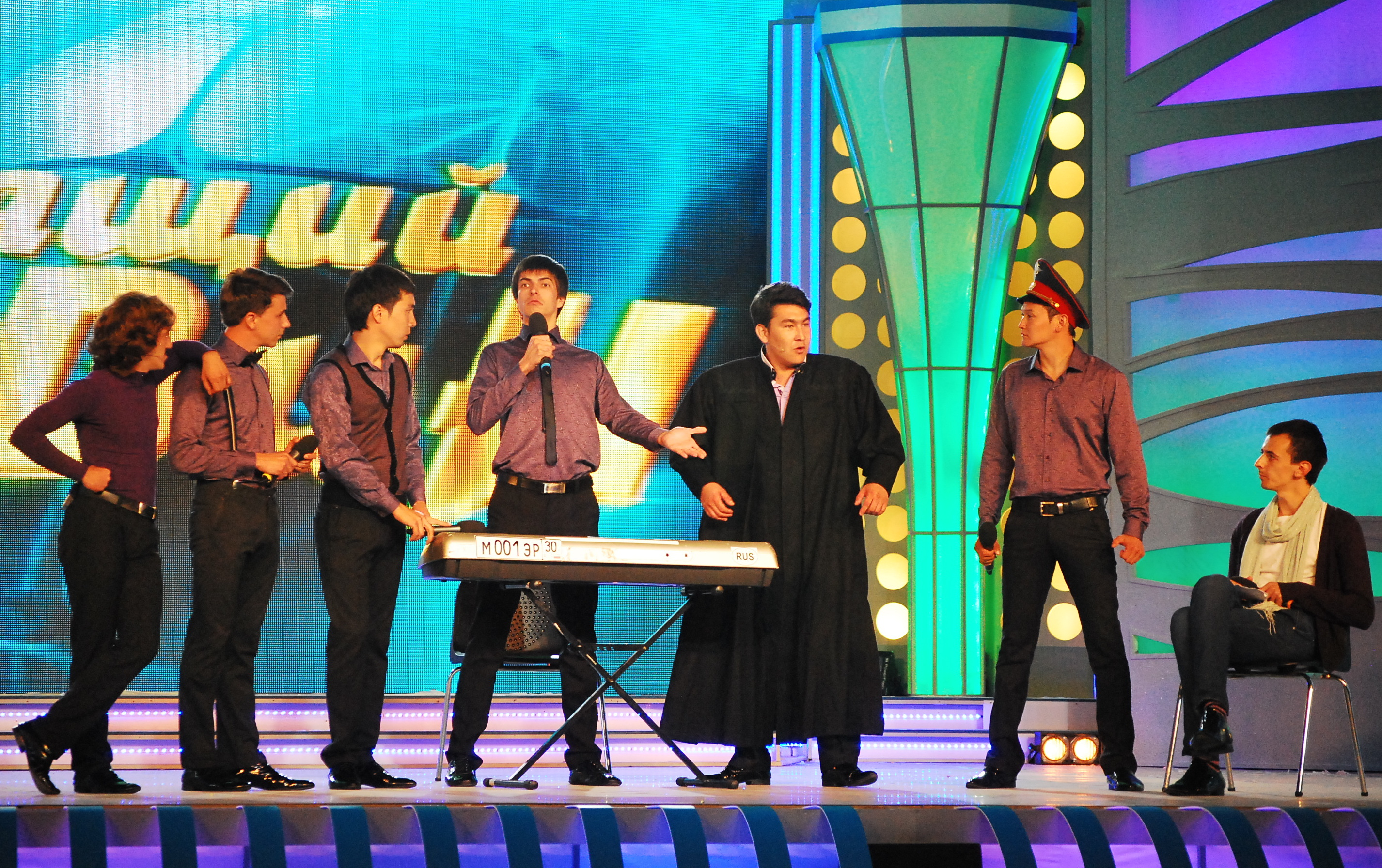 Сборная Камызякского края по КВНу, Астраханская область на фестивале КВН "Голосящий КиВиН" (2012)